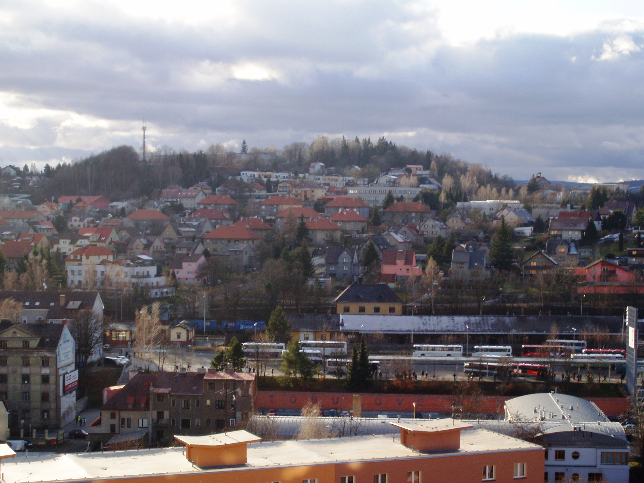 Česky: Pohled na městskou část - Příbram IV z věžáku